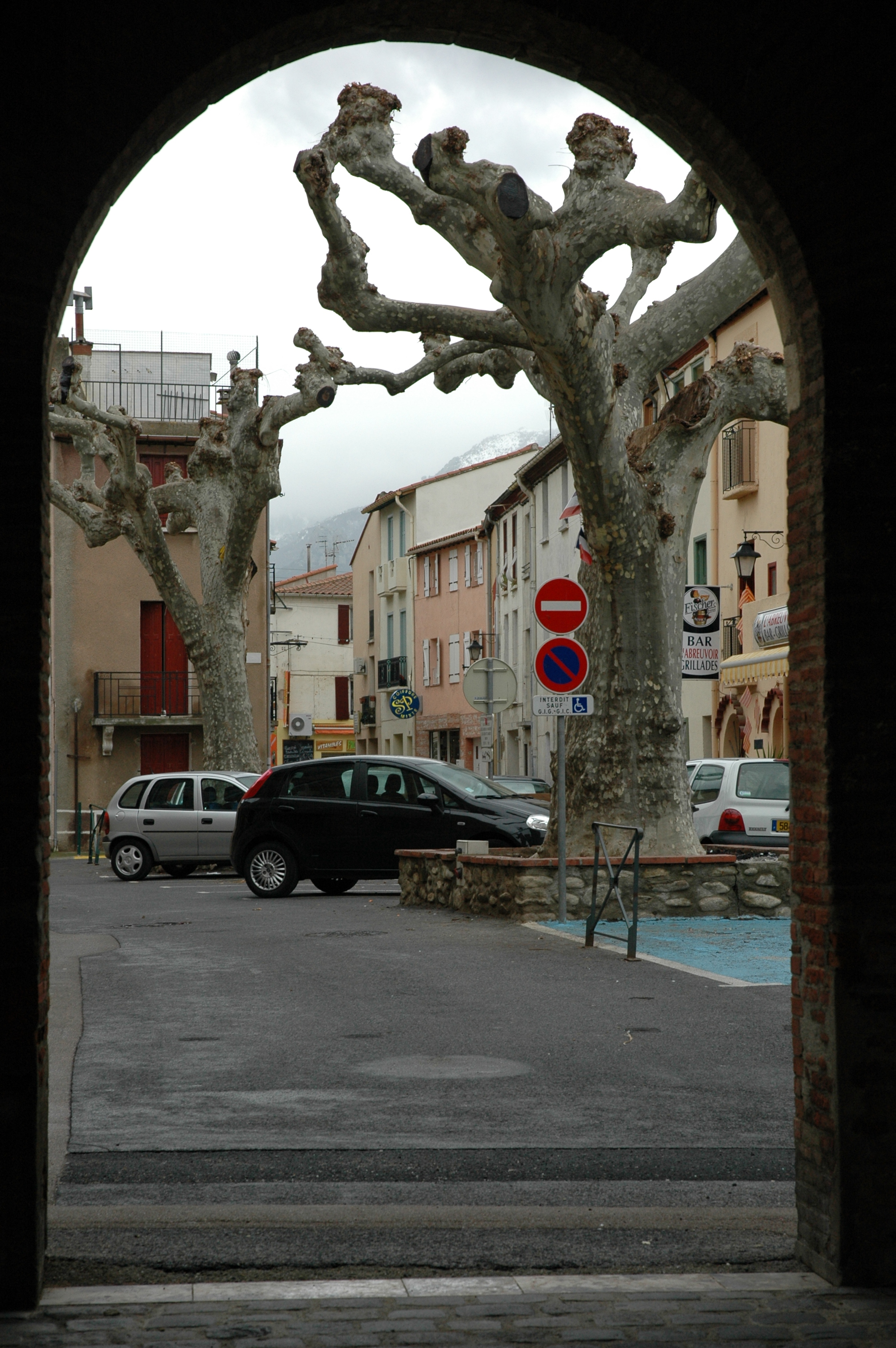 Sant Andreu de Sureda - Carrer Arago